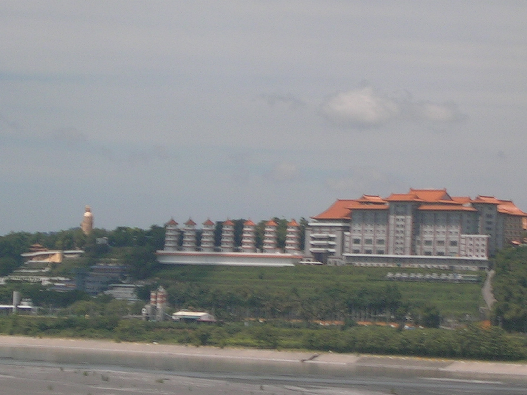 從國道三號遠望佛光山。